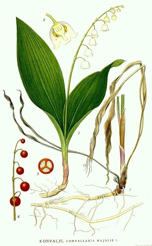 Convallaria majalis L. Original Description Konvalje, Convallaria majalis L.